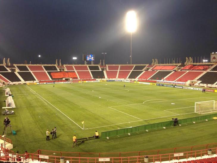 ملعب أحمد بن علي قبل مباراة الريان ونادي الشباب السعودي في دوري آبطال آسيا